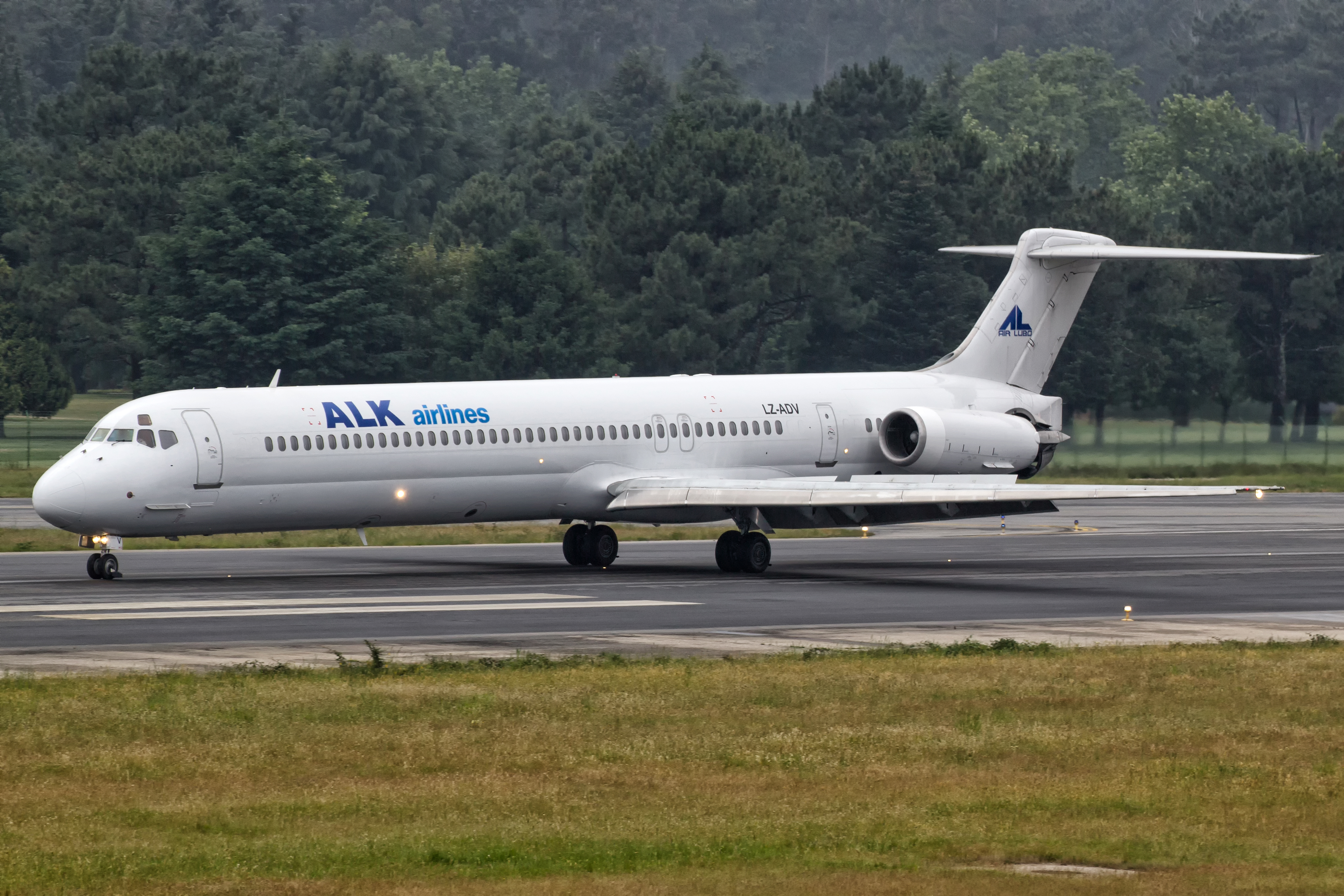 McDonnell Douglas MD-82 de ALK Airlines tras aterrar no aeroporto de Vigo.